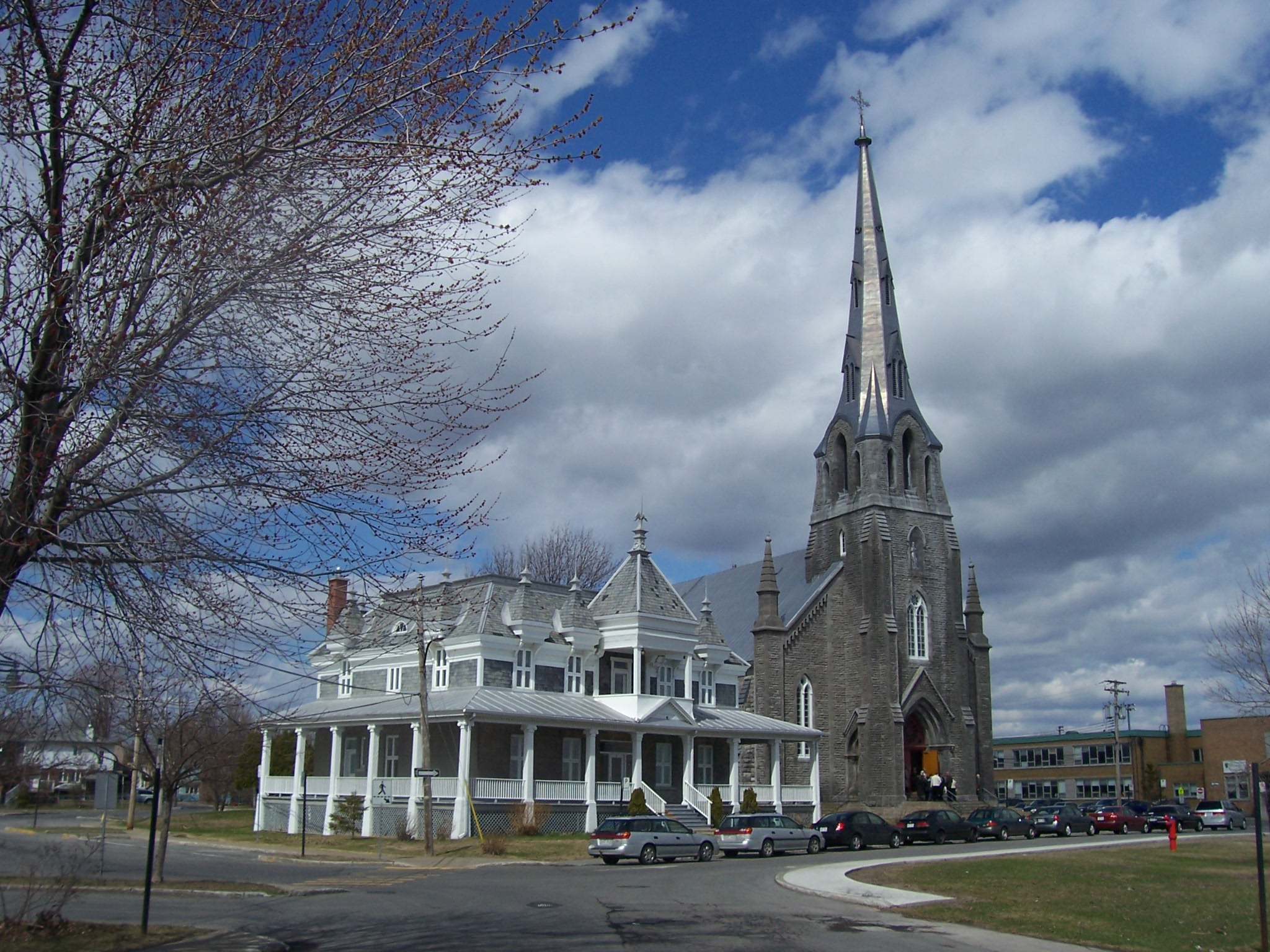 L'église Saint-Joachim de Pointe-Claire ainsi que son presbytère (à Pointe-Claire sur l'île de Montréal)